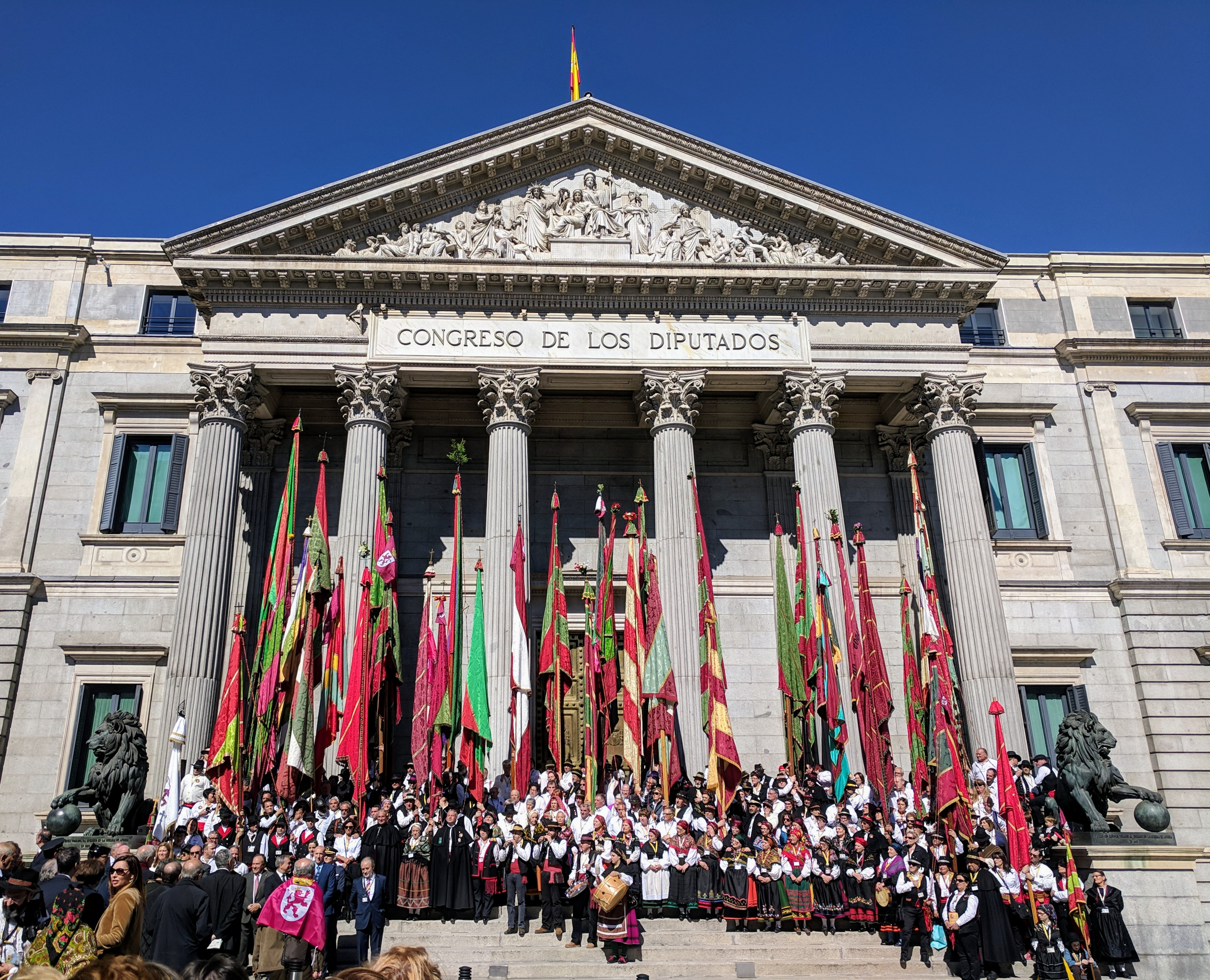 Pendones de León frente al Congreso de los Diputados (Madrid) con motivo del reconocimiento de León como cuna del Parlamentarismo por parte de las Cortes Generales.